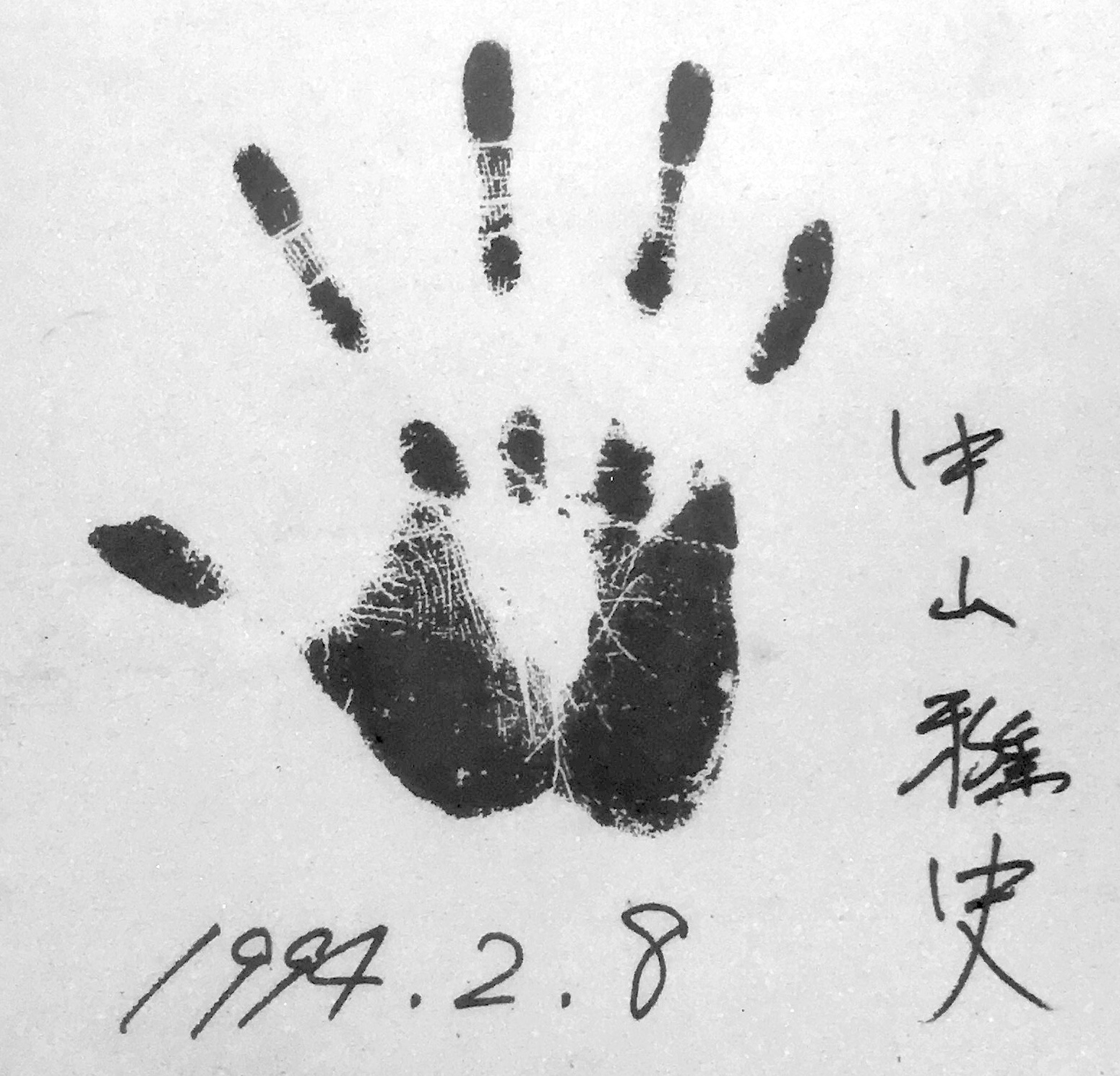 Masashi Nakayama's autograph (中山雅史のサイン)